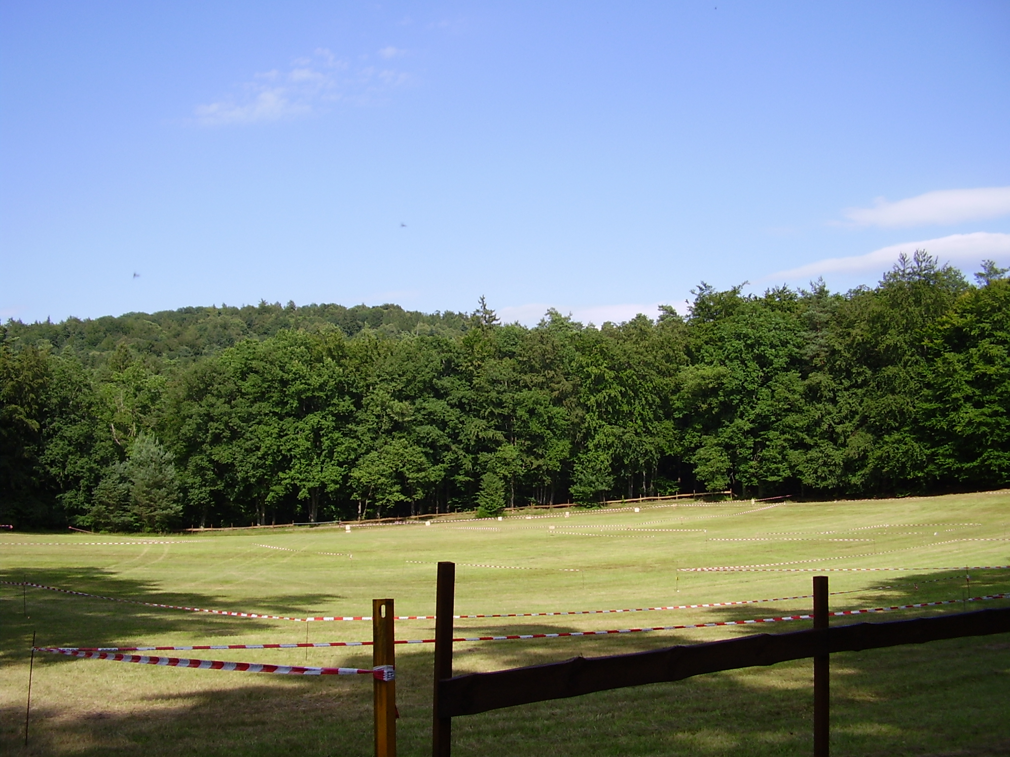 leeres Fahrelager der Bergrennstrecke Homburg (Saarland)